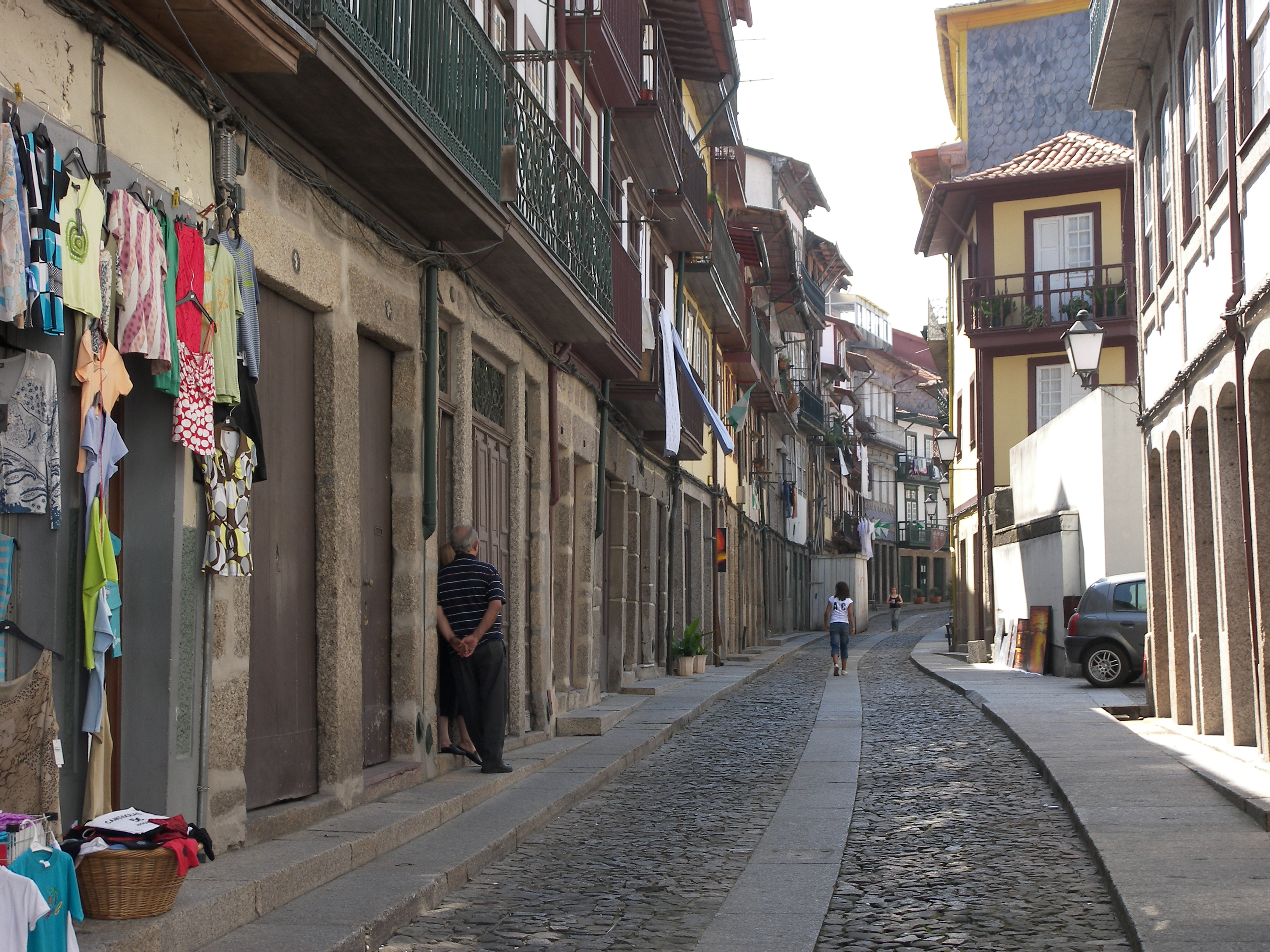 Guimarães-Altstadt